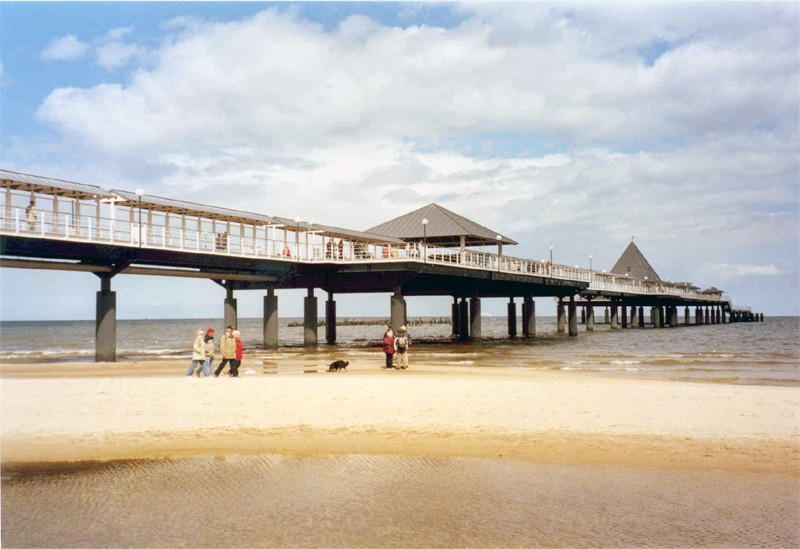 Seebrücke bei Heringsdorf auf Usedom im Mai 2005.